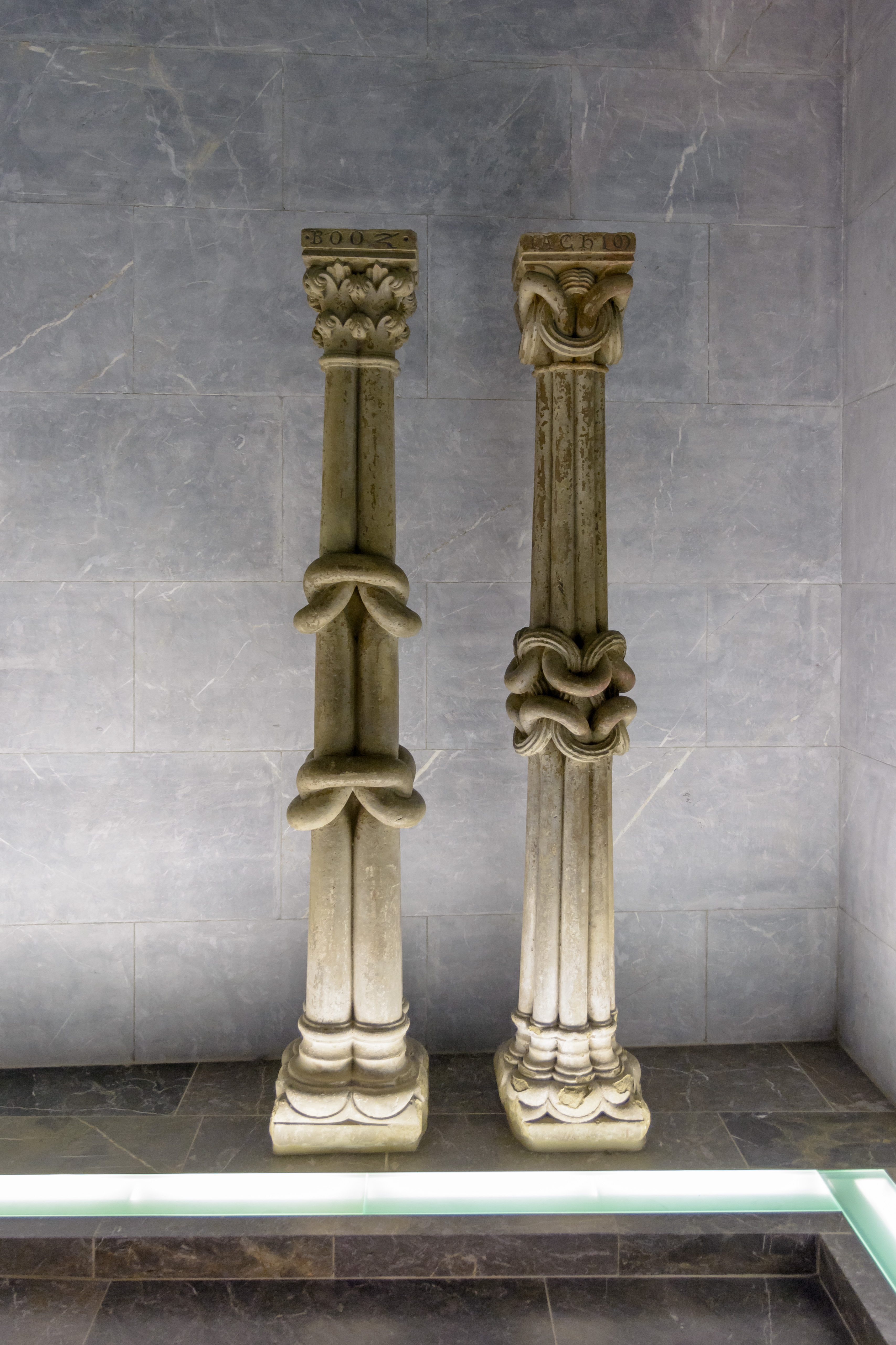 Würzburg, Dom St. Kilian, KnotensäulenThis is a photograph of an architectural monument.